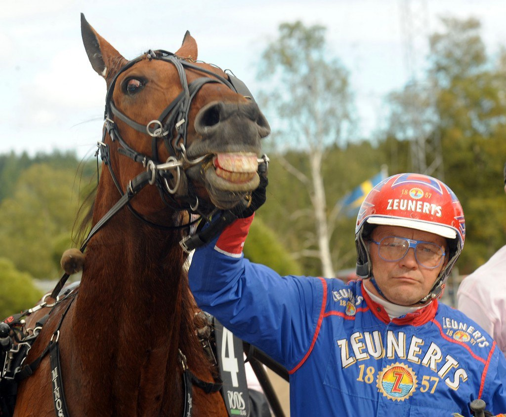 Minos Vang och Torbjörn Jansson